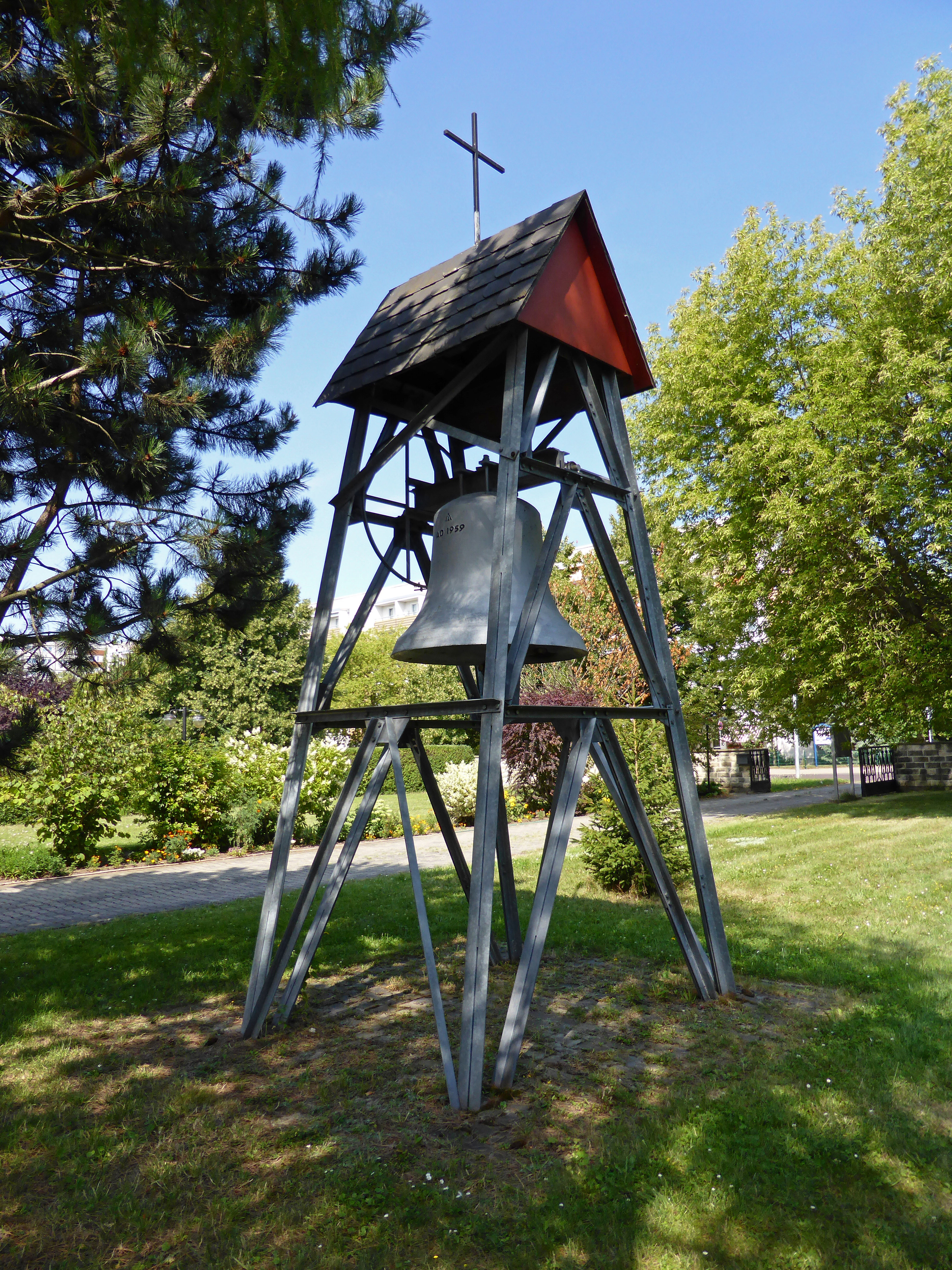 Glockenturm an der katholischen St.-Adalbert-Kirche in Magdeburg.